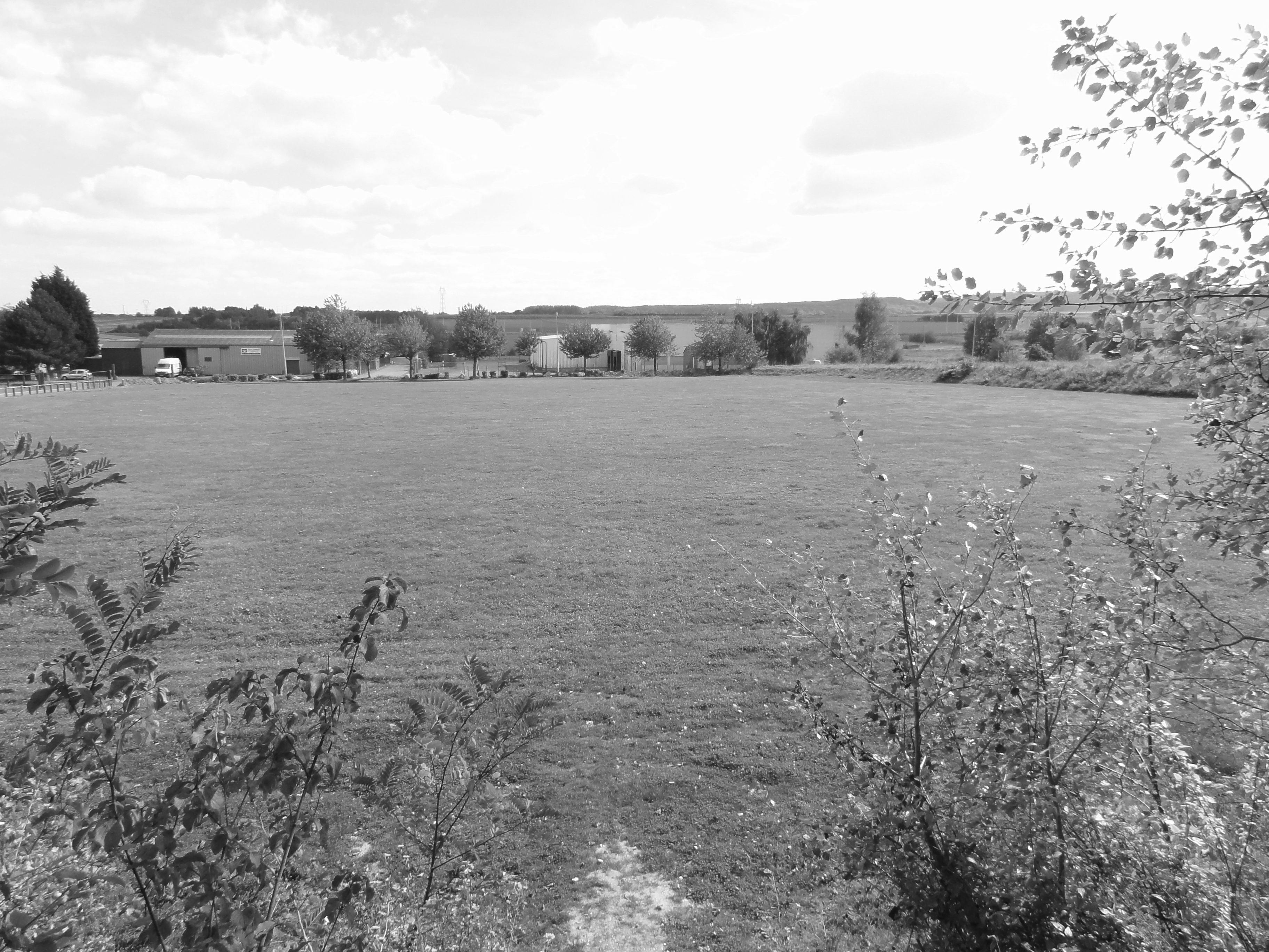 Terril n° 65 dit 10 de Béthune Est, disparu, Fosse n° 10 - 10 bis de la Compagnie des mines de Béthune, Aix-Noulette, Pas-de-Calais, Nord-Pas-de-Calais, France.